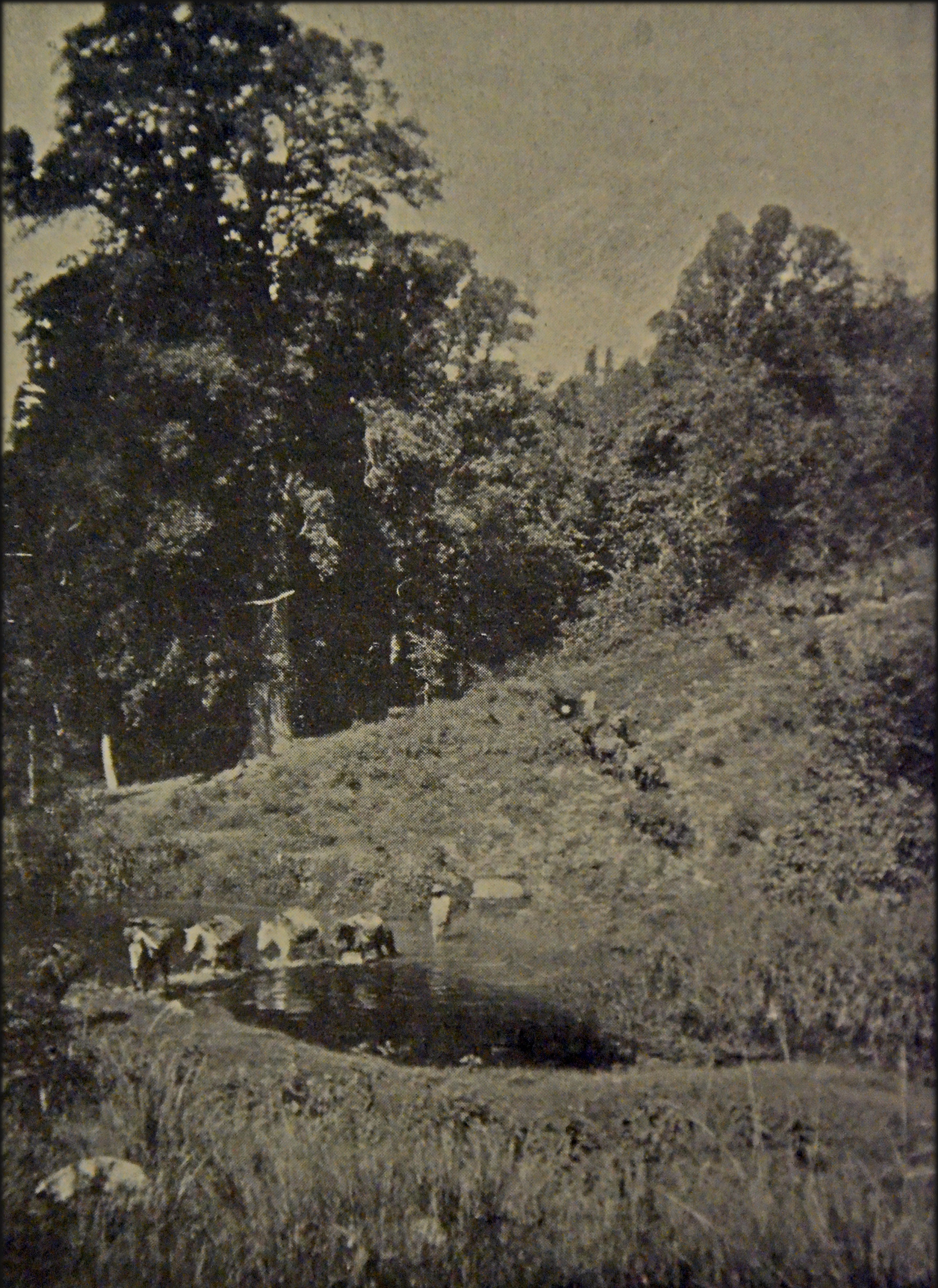 Photo ancienne, illustrant un article sur l'Abyssinie dans la revue française "Revue illustrée" (Tome relié 1902) ; "Forêt de Bourca", entre les villes de Harrar et Addis-Ababa. .